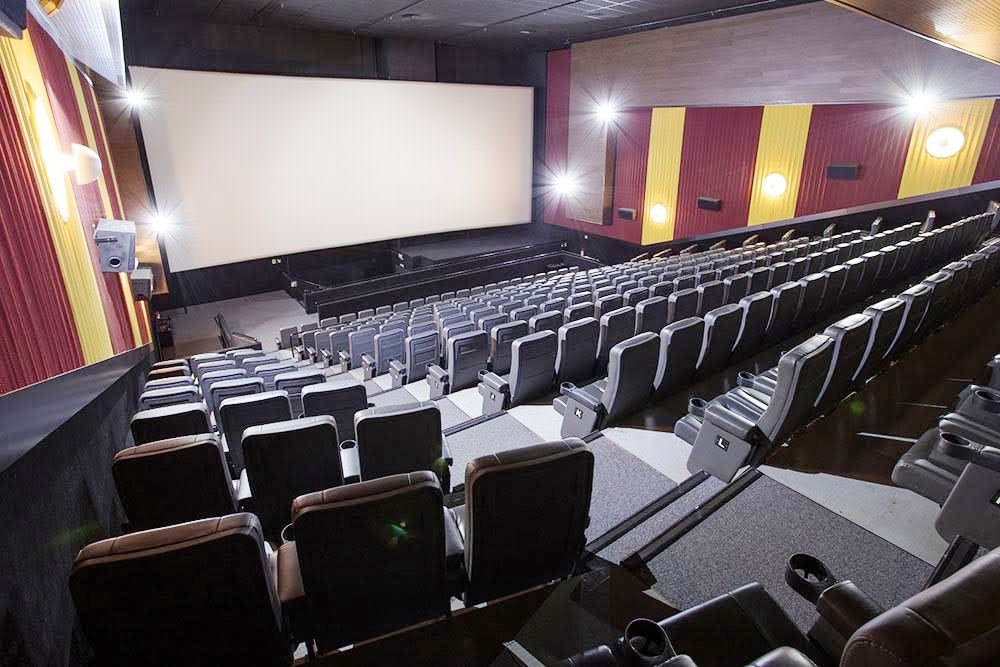 Interior da sala Cineflix Maringá Park, de Maringá, PR